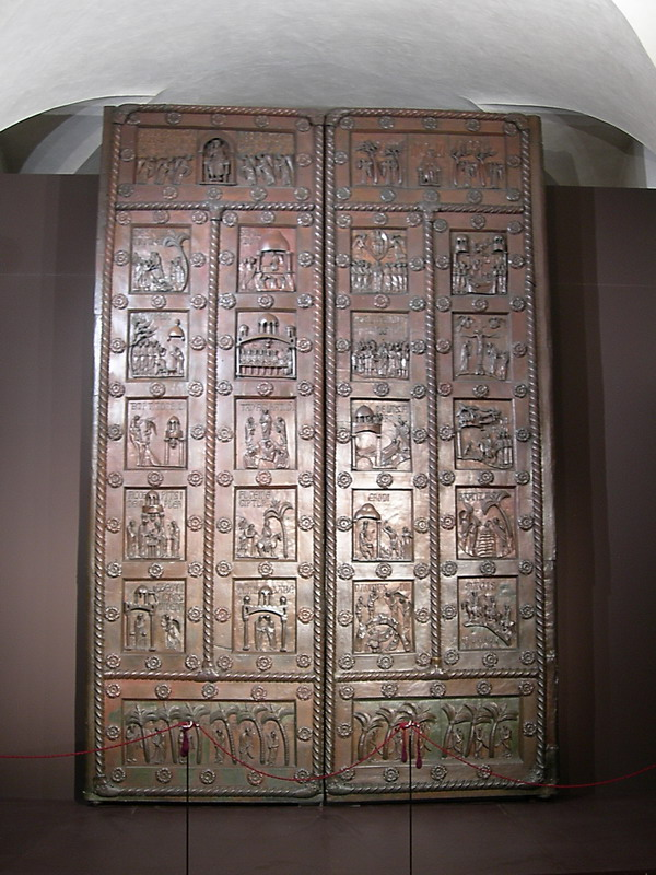 Portale bronzeo di Bonanno Pisano (1179). Collocato originariamente nella porta di San Ranieri nel Duomo di Pisa, ora nel Museo dell'Opera del Duomo.